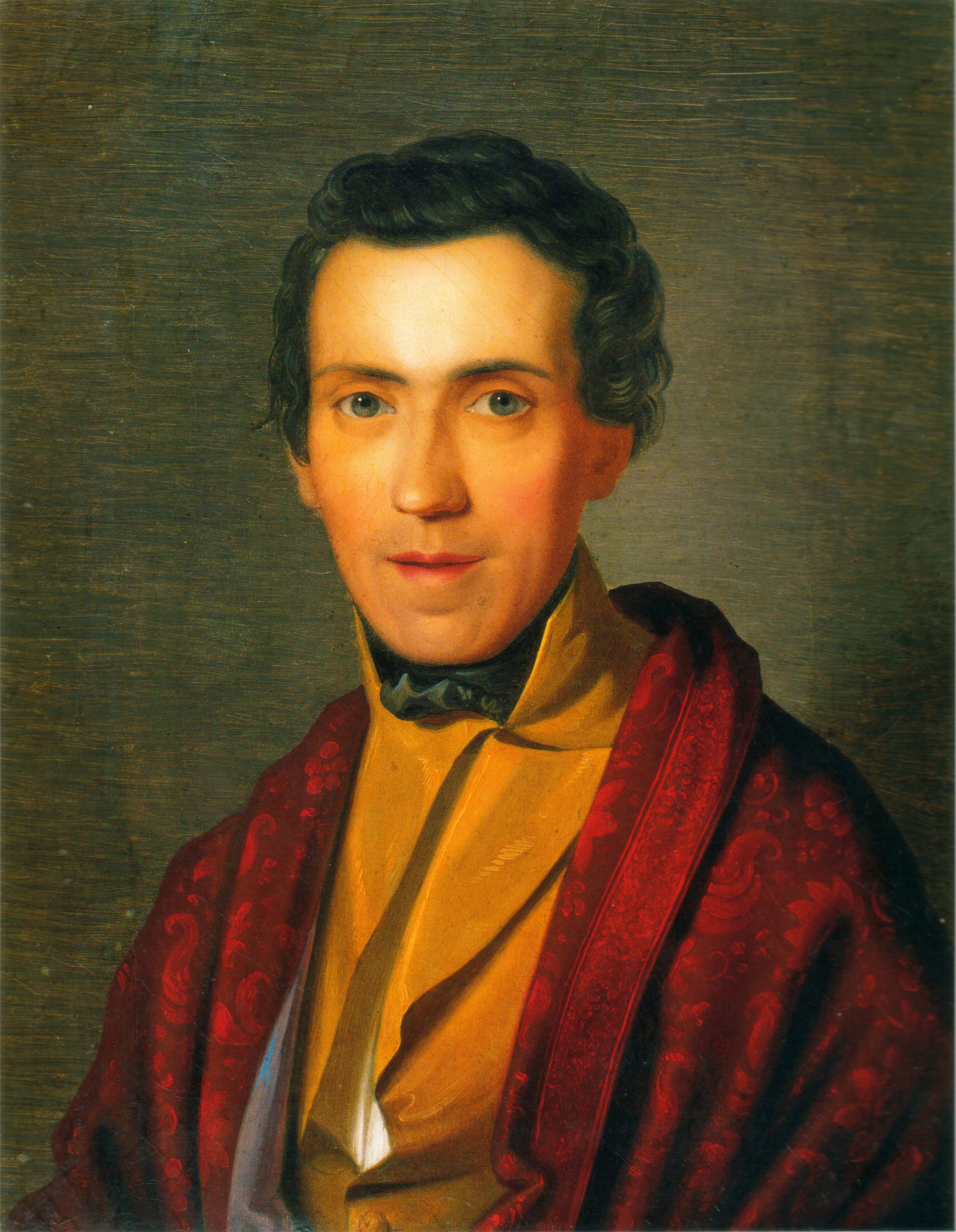 Bildnis Ludwig Richters